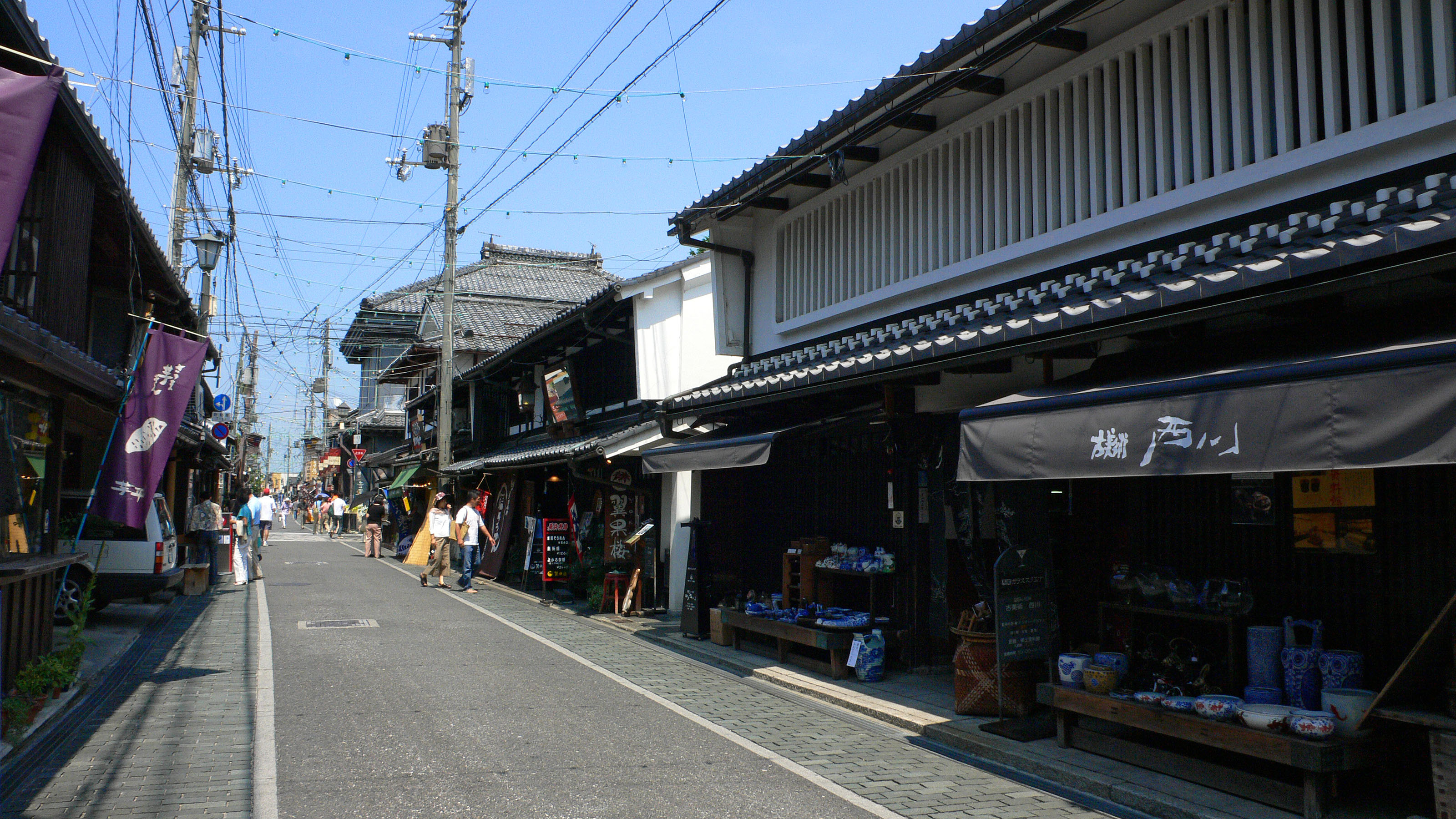 Kurokabe Square in Nagahama, Shiga, Japan